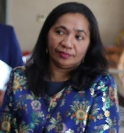 Kommissarin der Comissão Nacional de Eleições